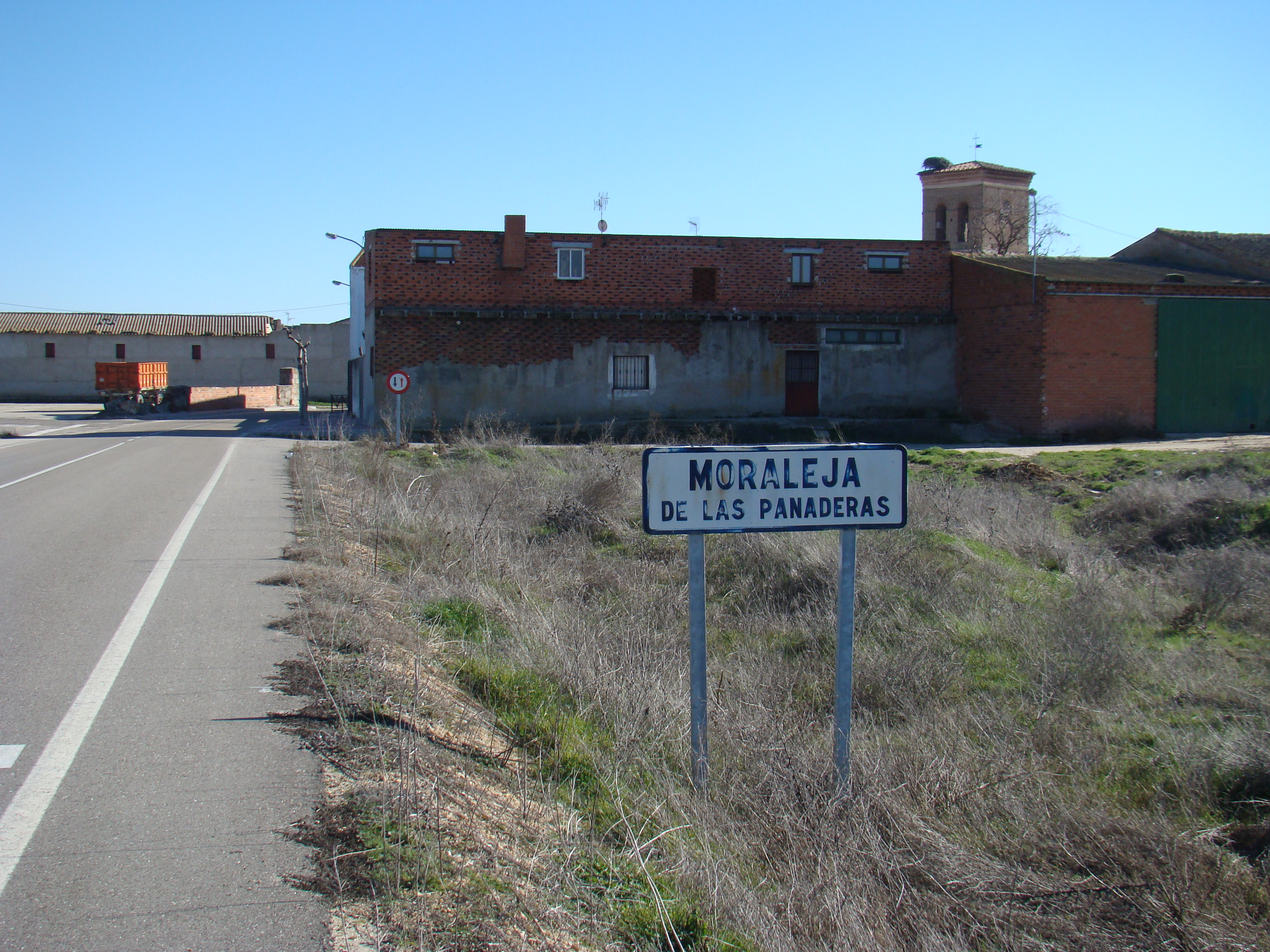 Llegada por la carretera a Moraleja de las Panaderas, municipio de Valladolid, España.